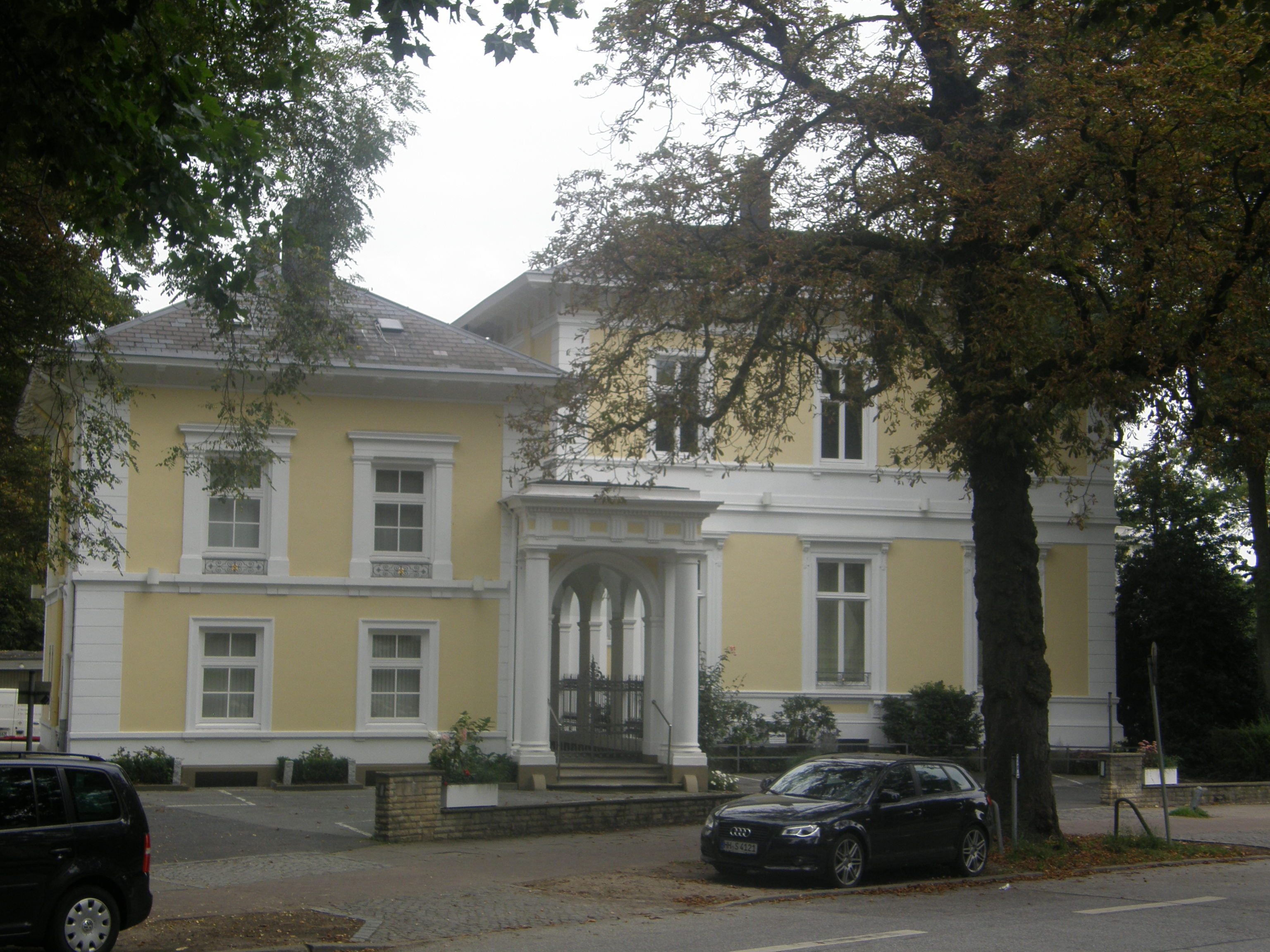 harvestehuder weg hamburg